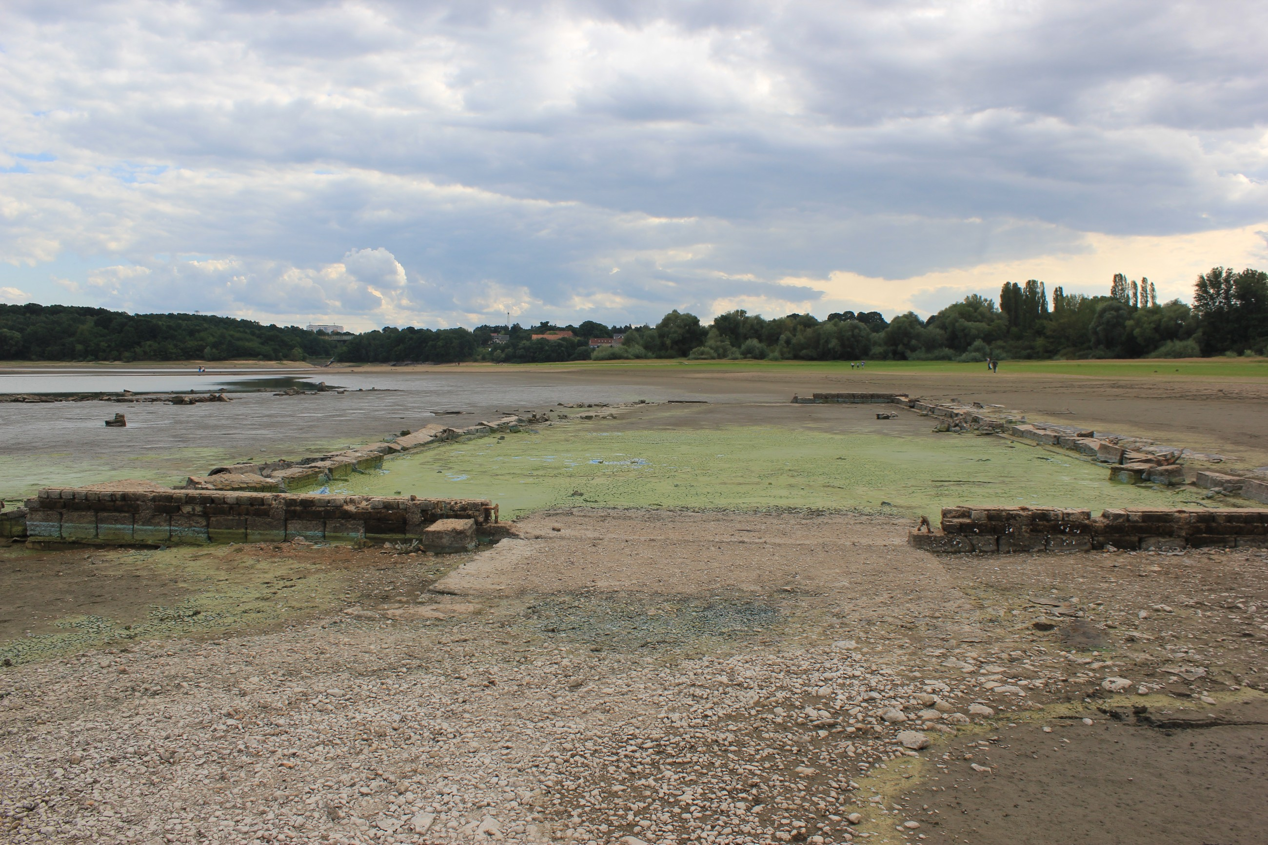 Hornjoserbsce: Powostanki něhdyšeje wsy Małsec w Budyskim spjatym jězorje.